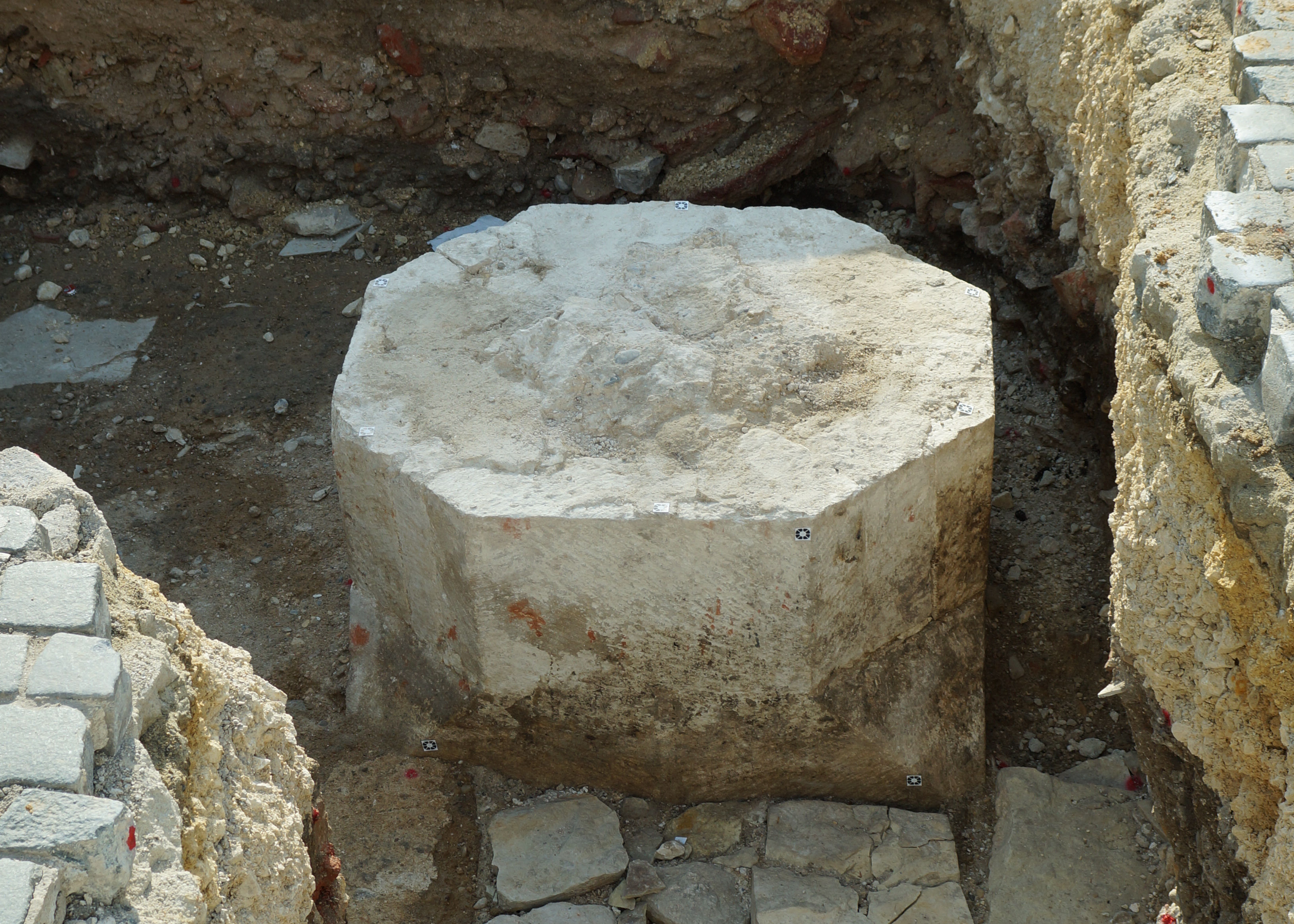 Säulenfragment der Klosterkirche St. Magdalena des gleichnamigen Klarissenklosters in Regensburg. Im April 2015 ausgegraben auf dem Dachauplatz.